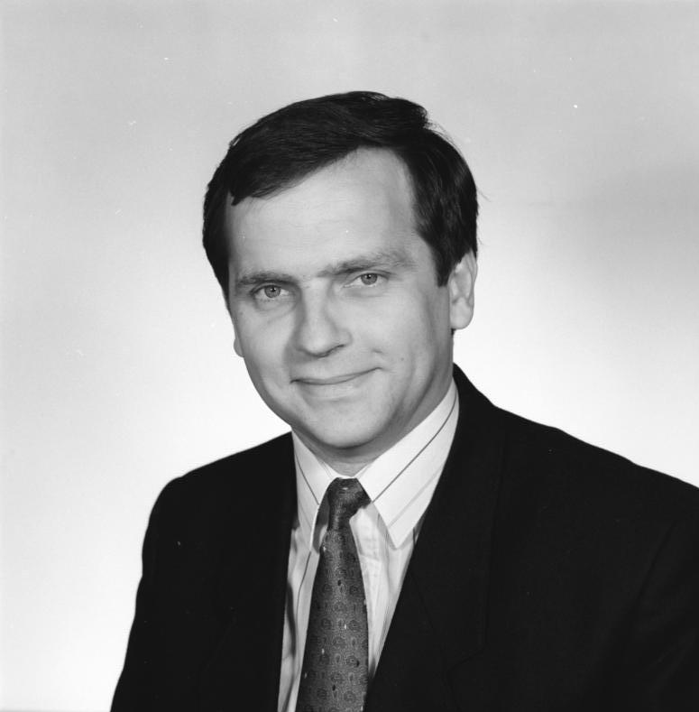 ADN-Schöps/11.7.90/Berlin: Dr. Günther Krause (CDU), Abgeordneter der Volkskammer und Parlamentarischer Staatssekretär.